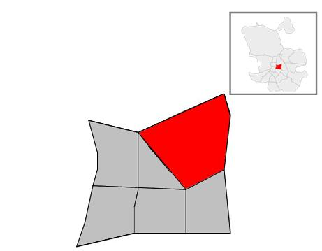 Barrio de La Guindalera